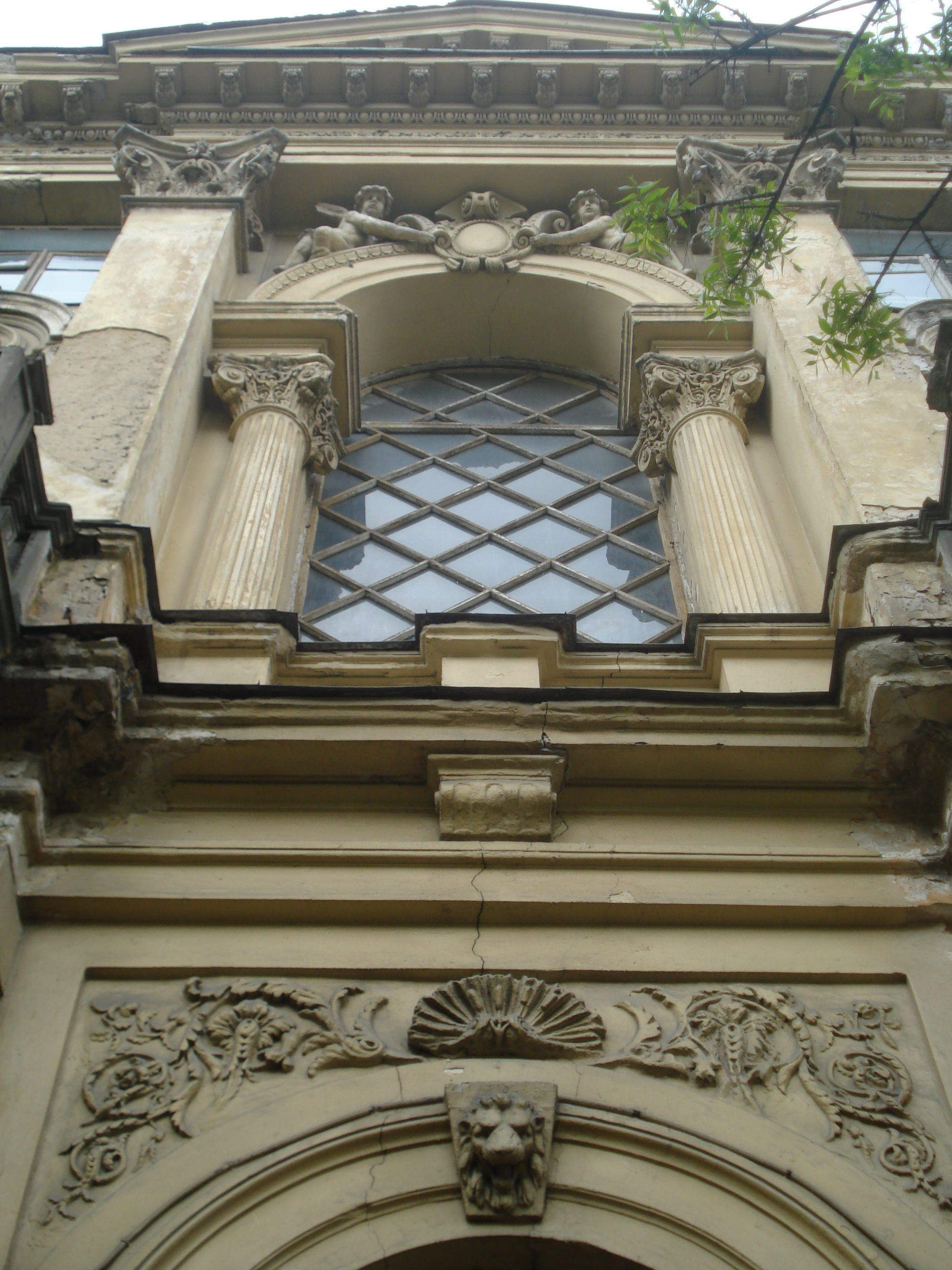 Jono Basanavičiaus gatvė 16 in Vilnius